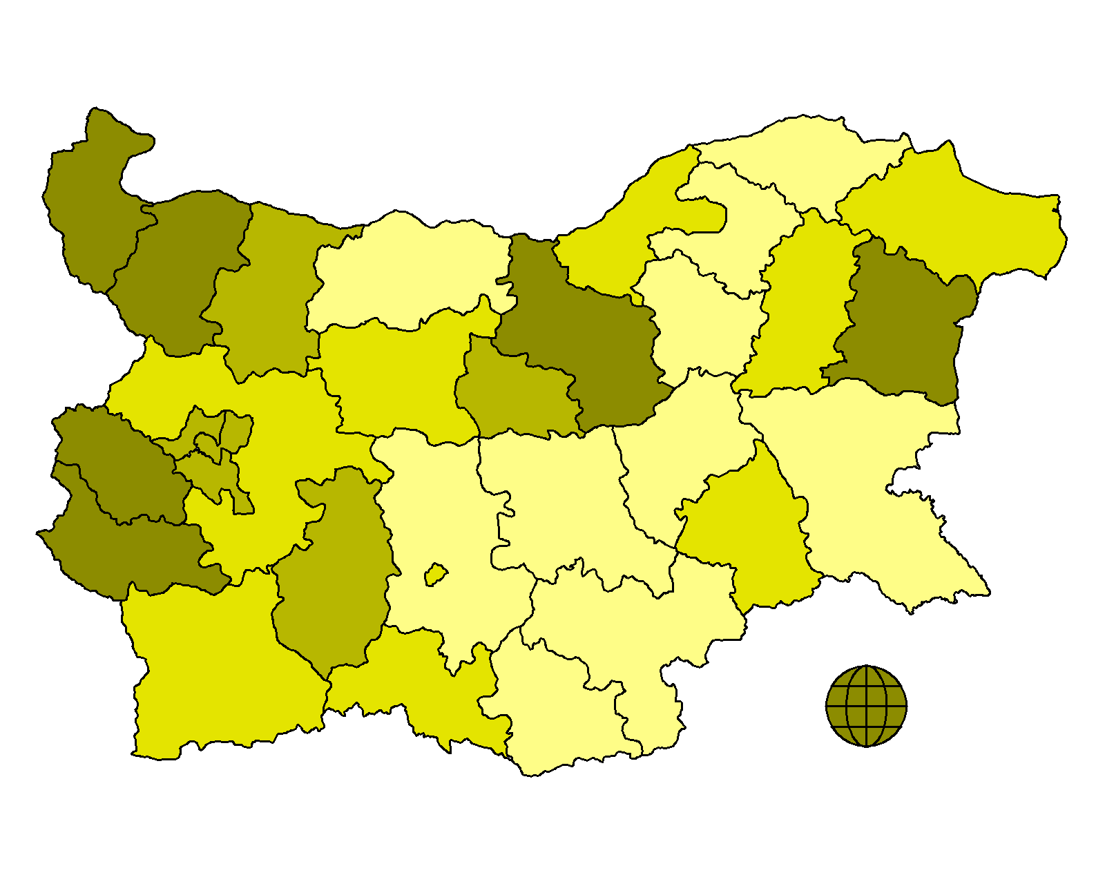 Гласуване по райони за НДСВ на изборите за Европейски парламент през 2007. Всеки от цветовете съответства на приблизително 1/4 от подадените гласове По тъмният цвят съответства на получен по-голям процент от гласовете